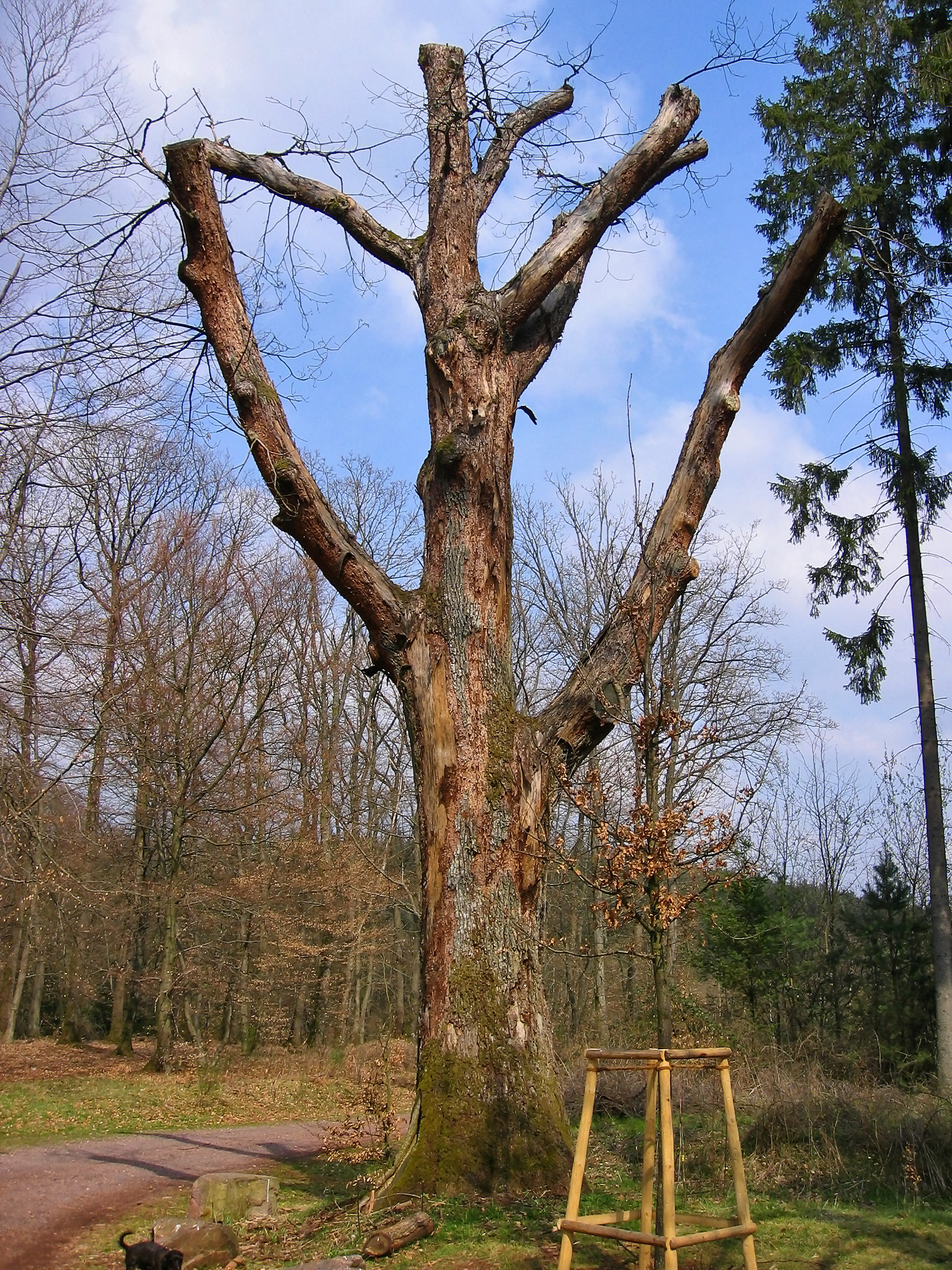 Ehemaliges Naturdenkmal "Biereiche" im Kammerforst bei Merzig. Der abgestorbene Baum wurde 2005 gefällt.